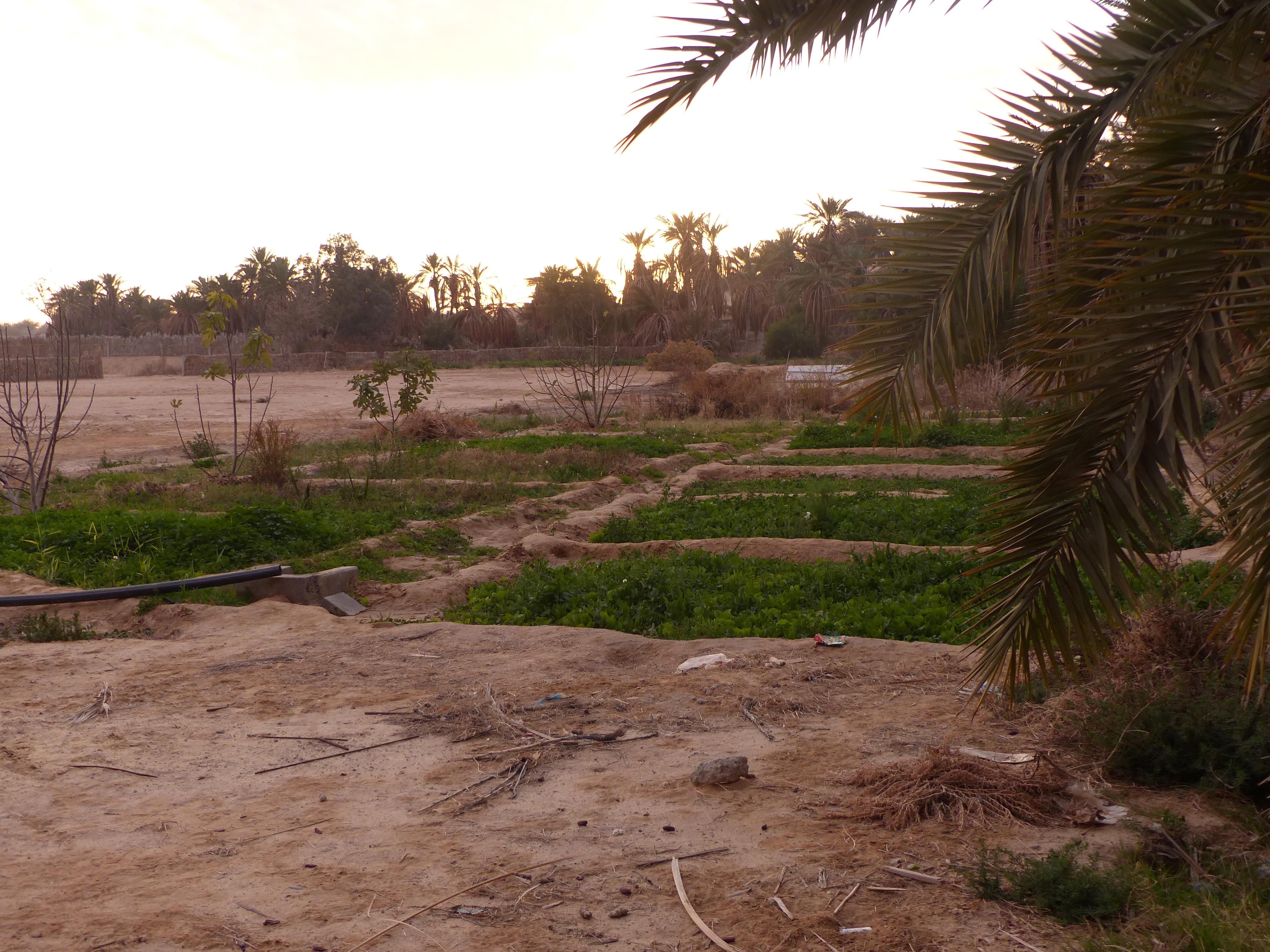 Culture à étages à Tozeur